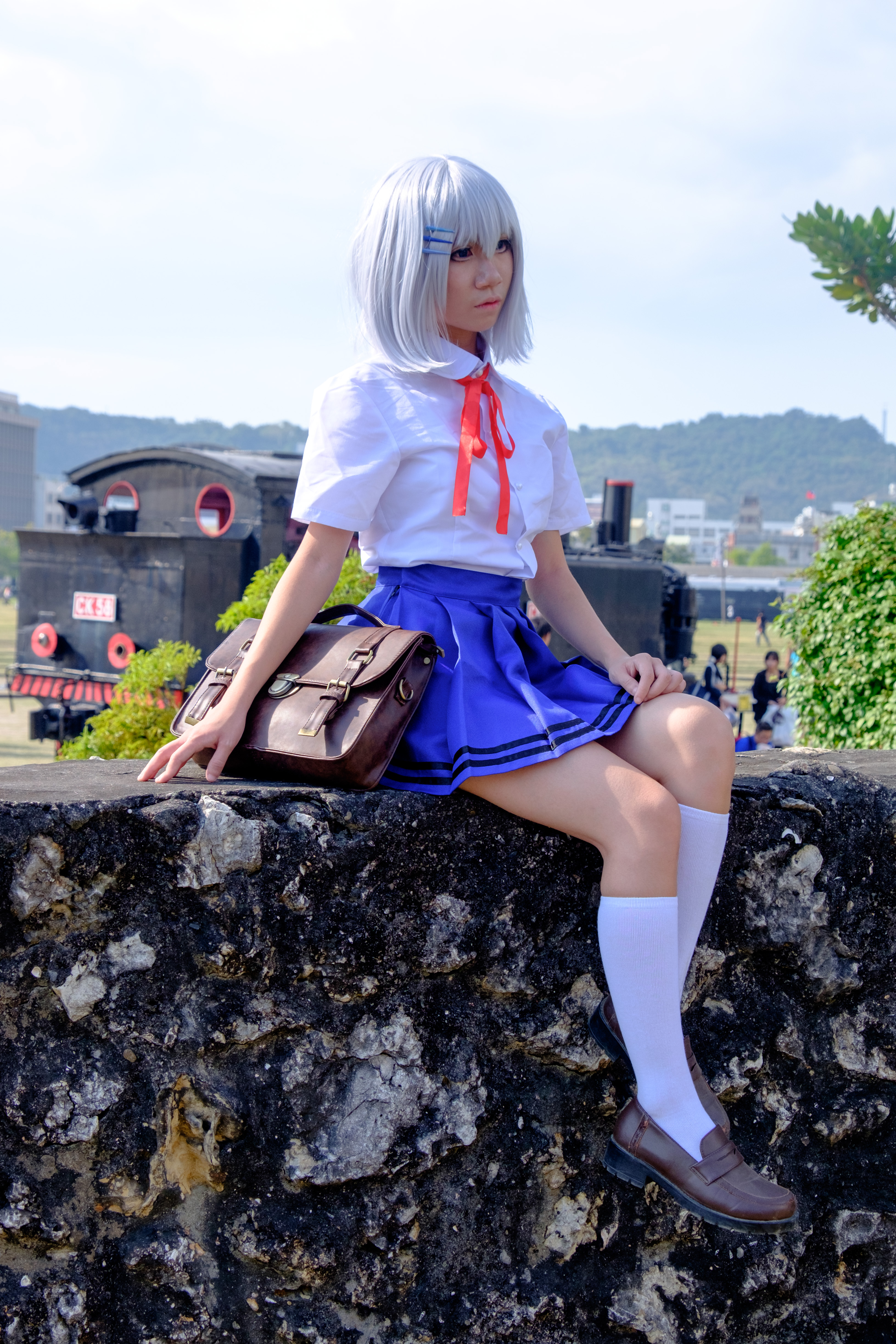 2015駁二動漫祭第二日下午，坐在牆上的＜デート・ア・ライブ＞鳶一折紙cosplayer。